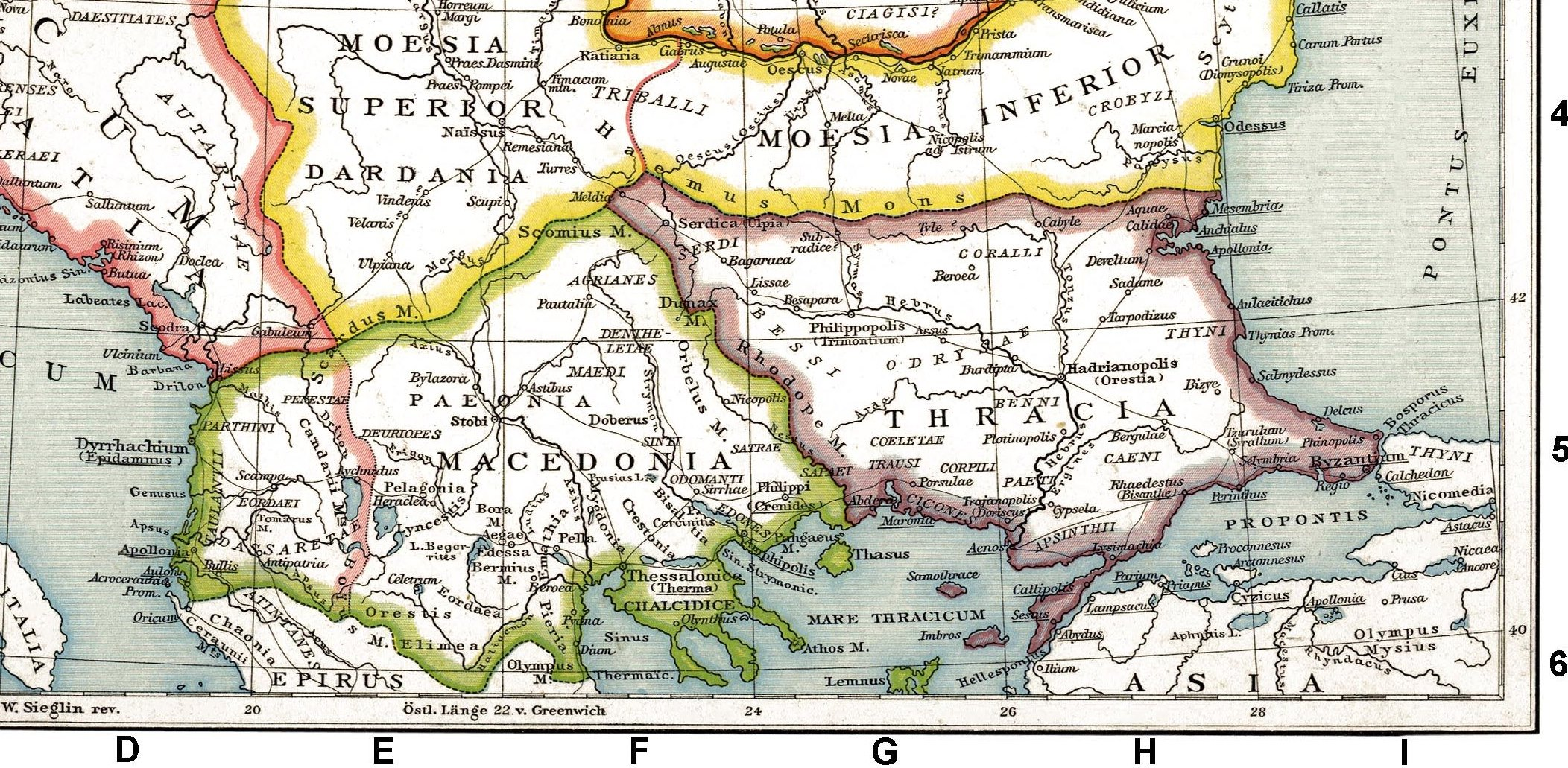 Provincia romana di Macedonia al tempo dell'imperatore Traiano (98-117 d.C.)